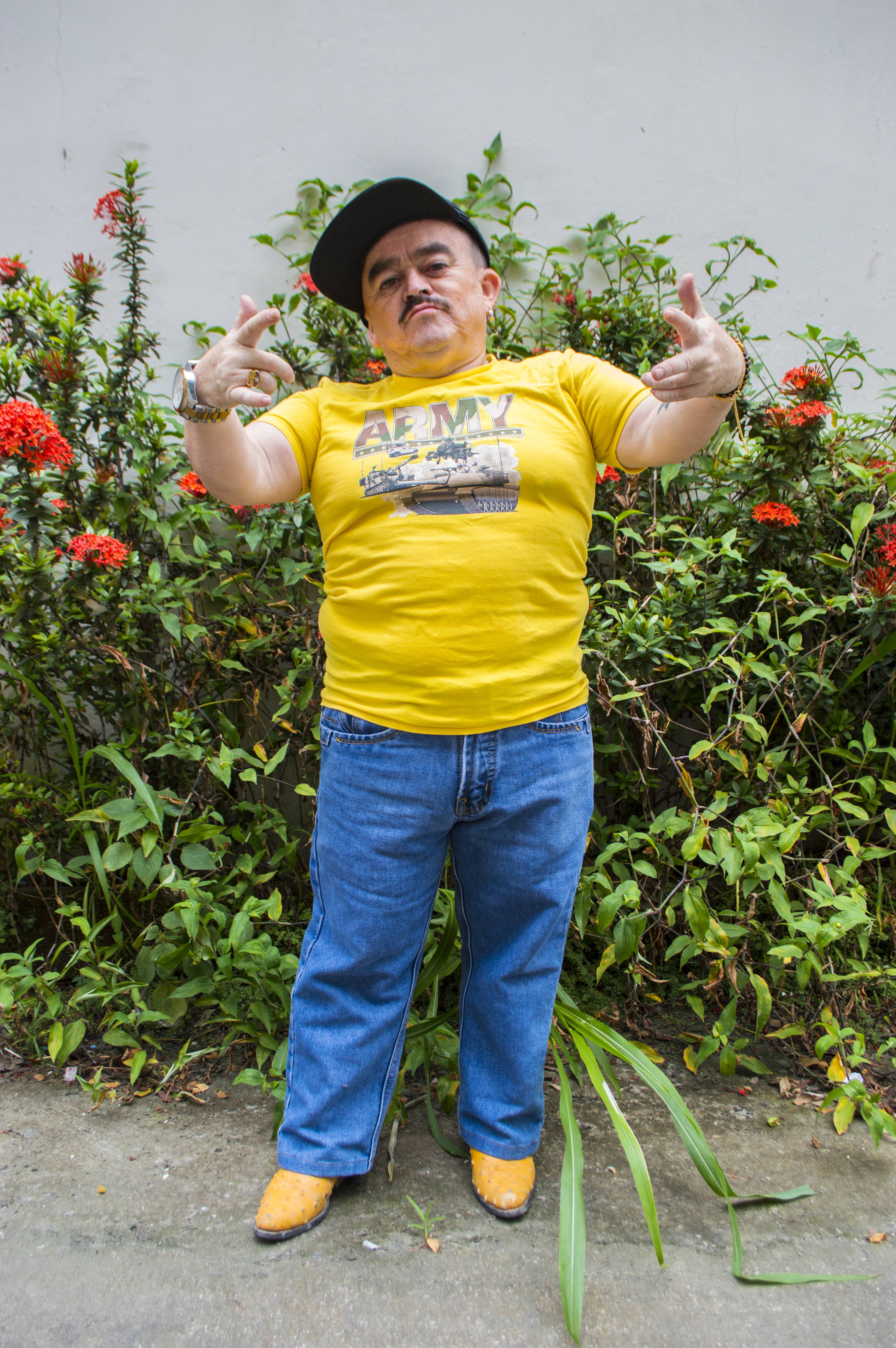 Vicente Romero Rivera en 2017